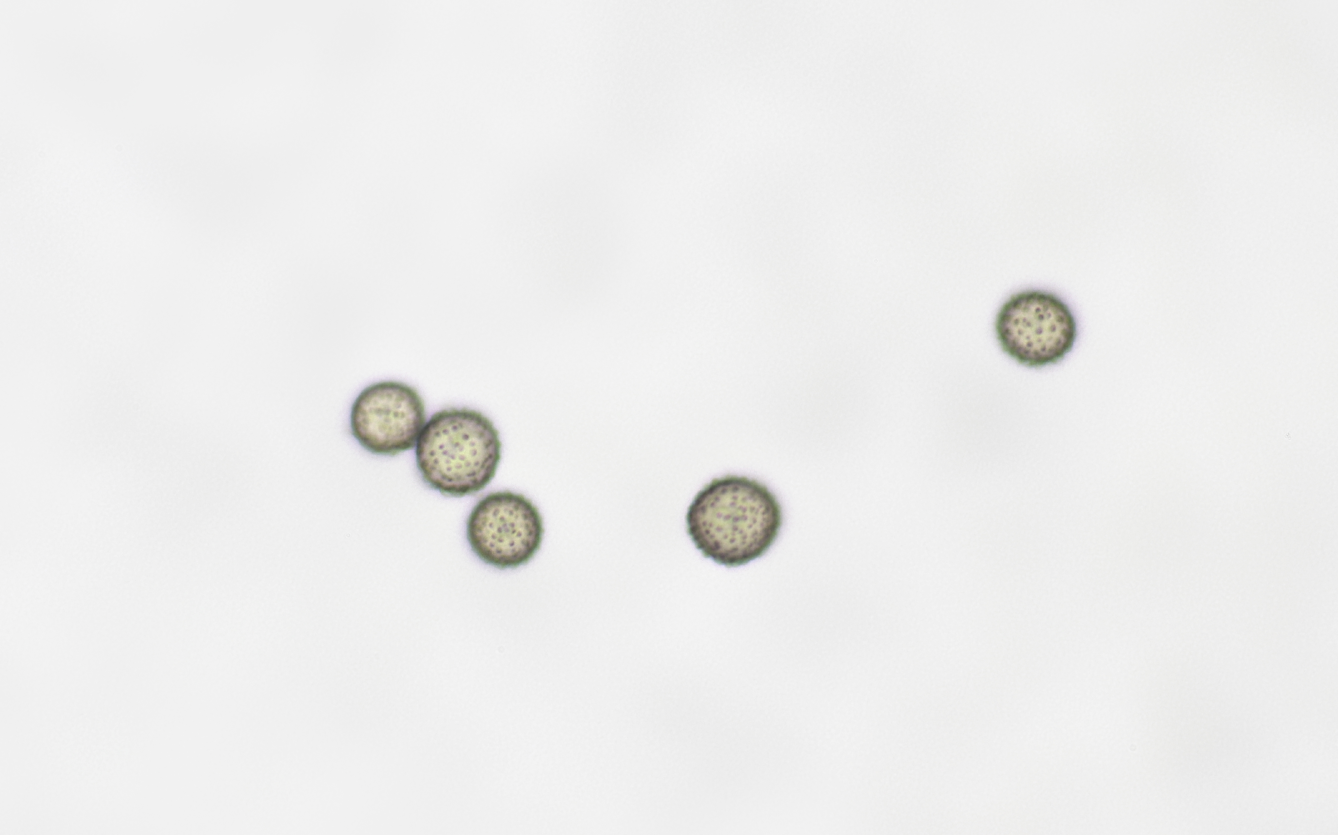 Sporenfoto, aufgenommen mit dem 50er Objektiv